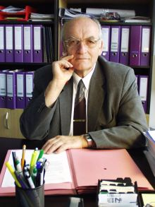 profesor Cigánek, fotografie